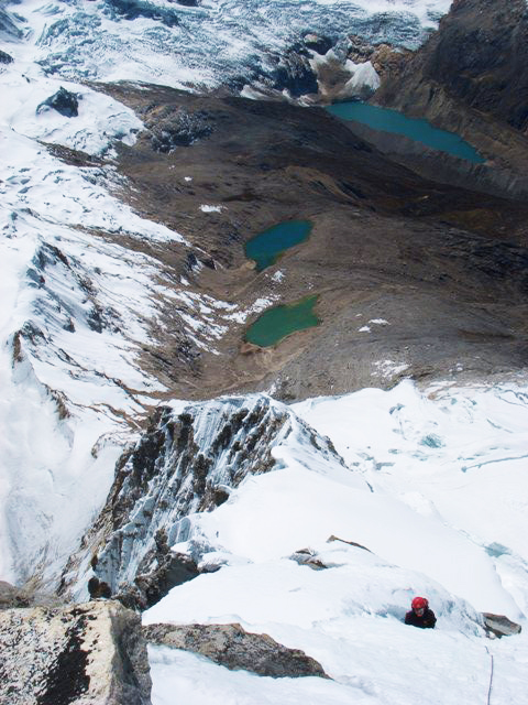 Ascenso por la cara norte